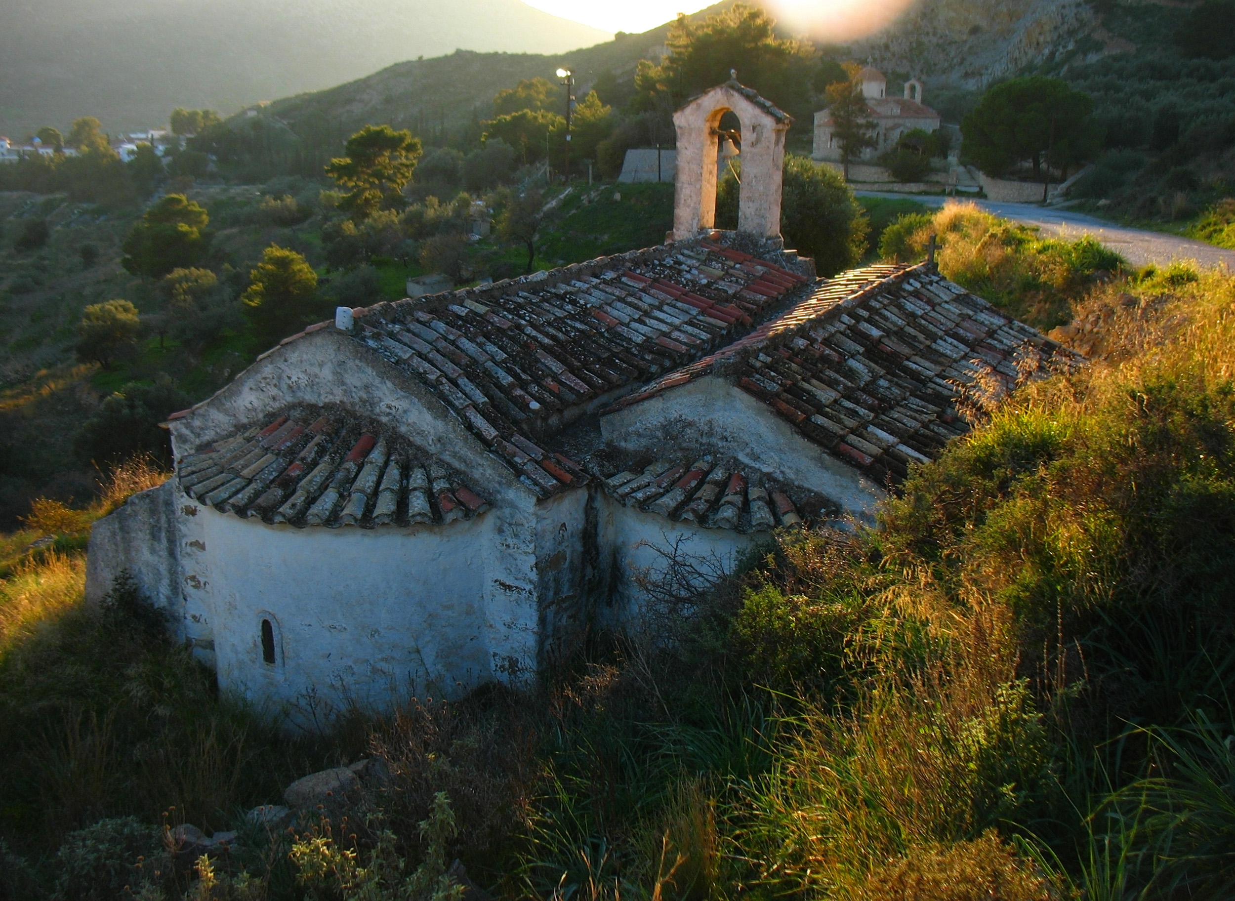 Παλαιοχώρα Αίγινας«Παλαιοχώρα Αίγινας»